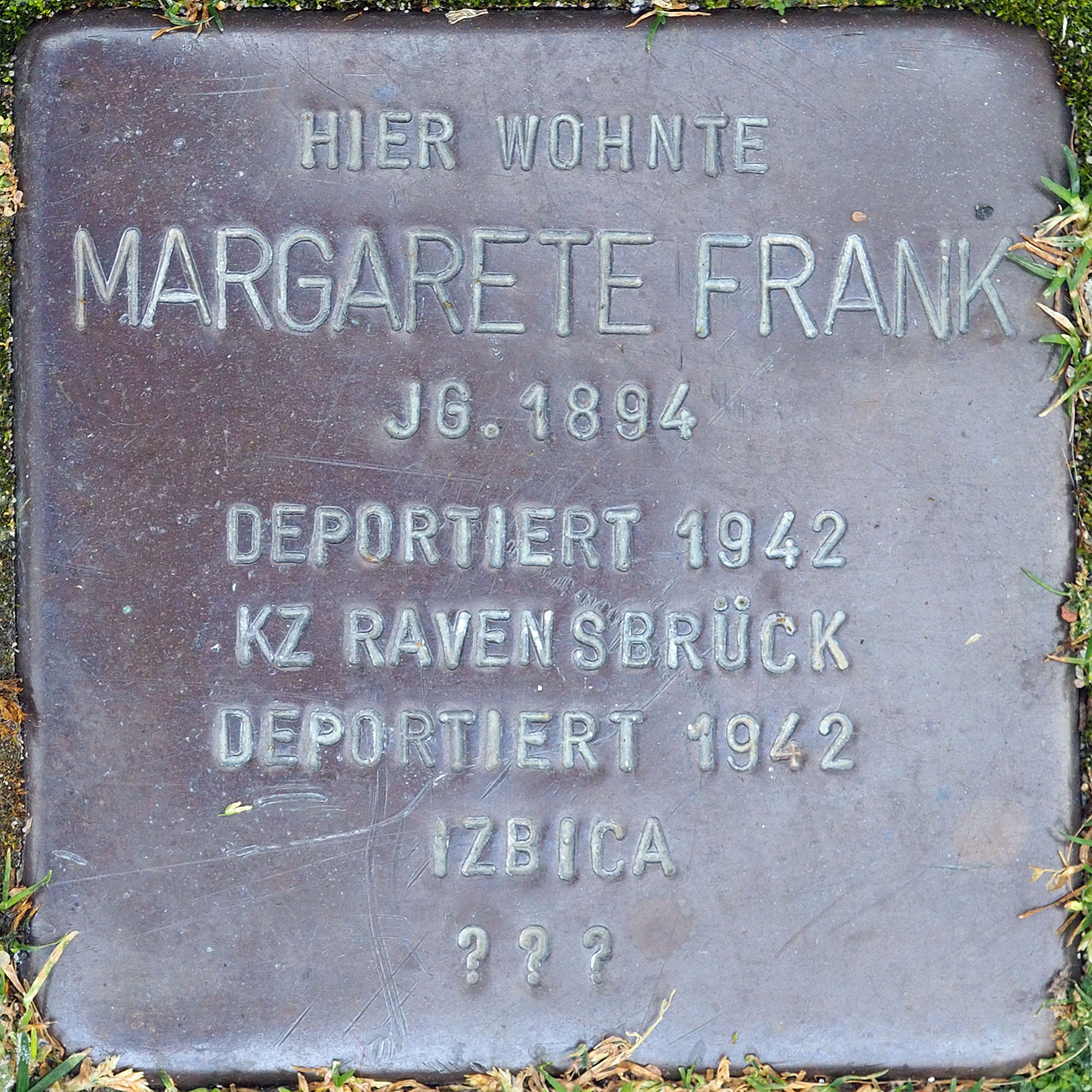 Stolpersteine MG: Frank, Margarete